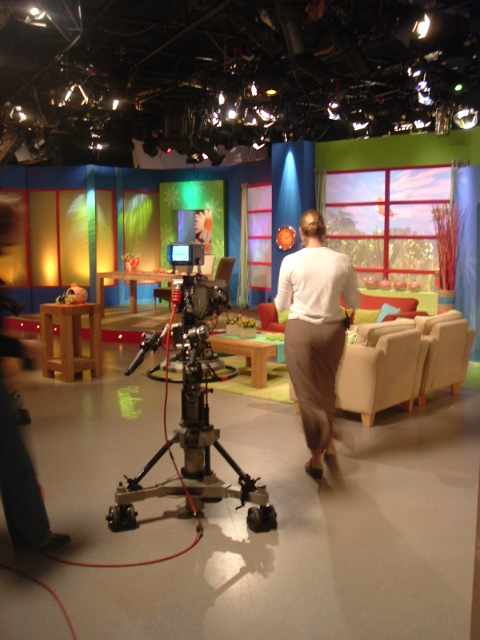 Set van Lijn 4